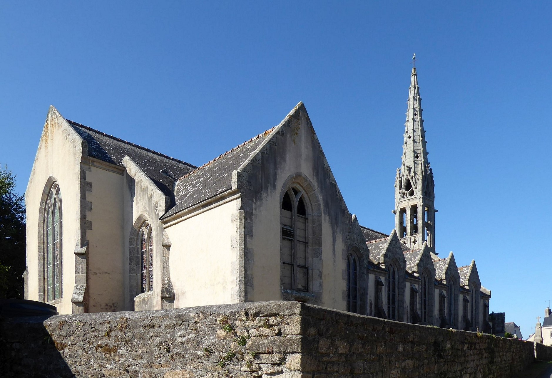 Église Saint-Jean-Baptiste de Saint-Jean-Trolimon